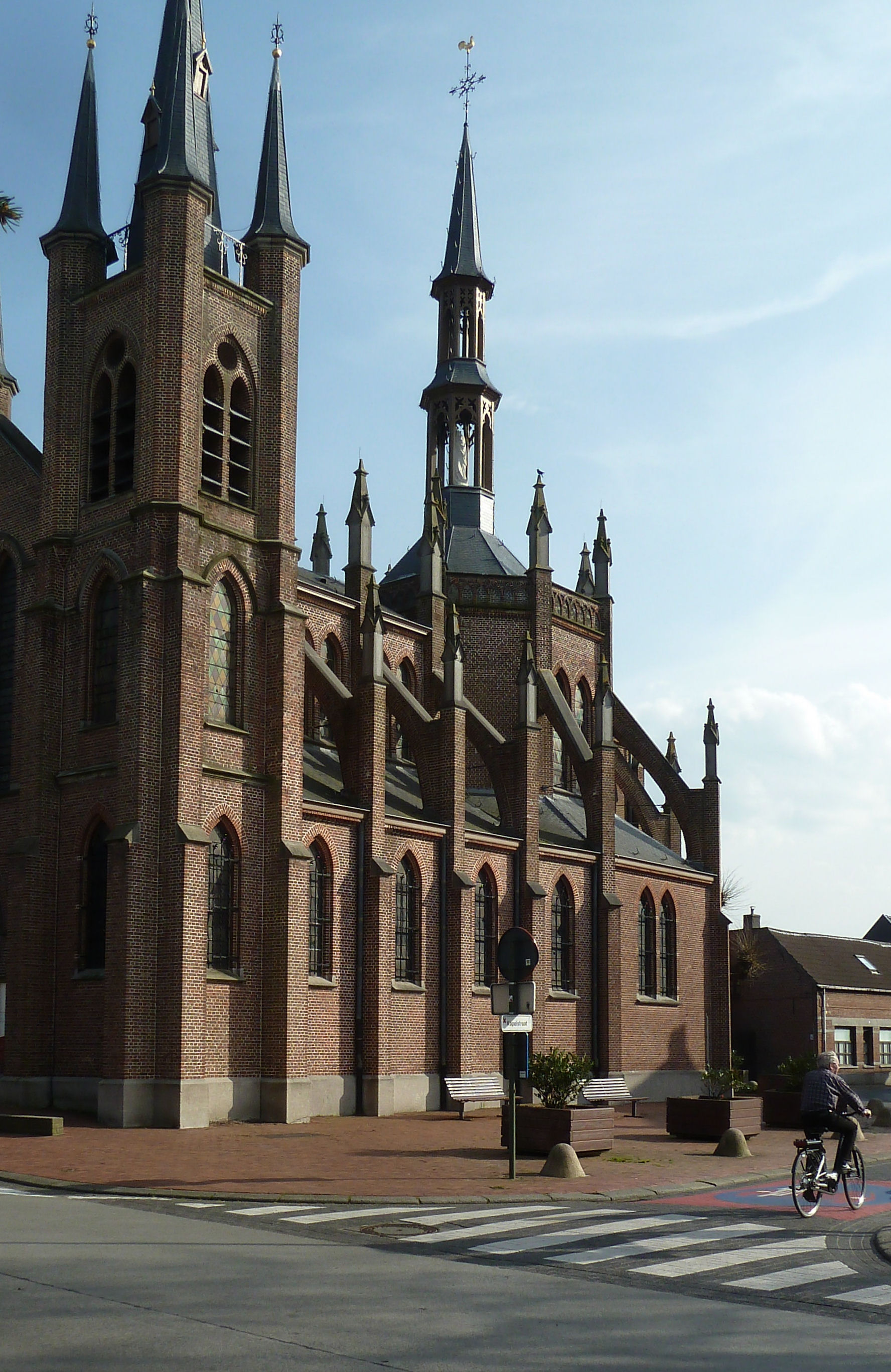 Sancturium OLV Gaverland